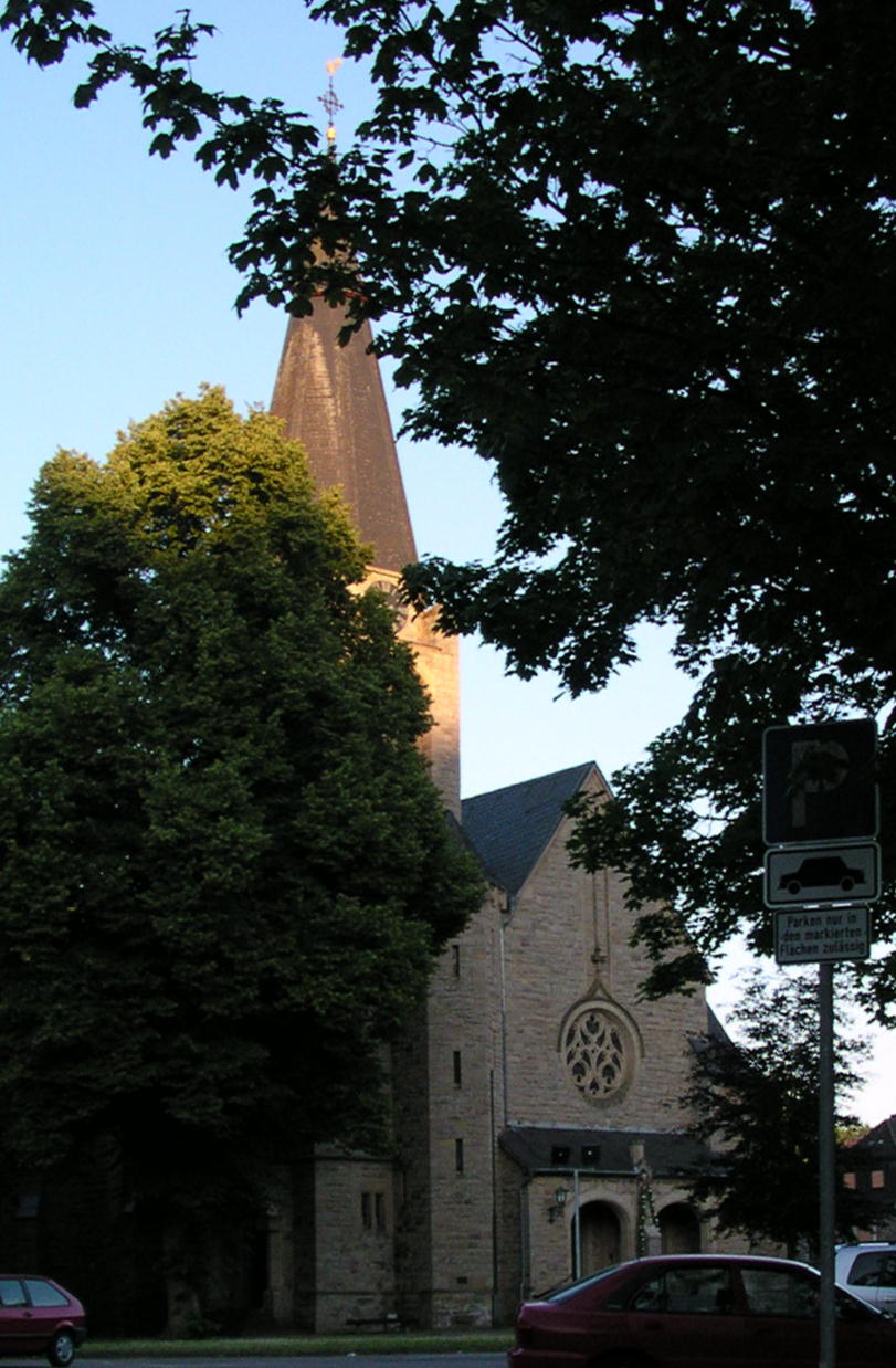 Stolberg Vicht, rk. Kirche St. Johann Baptist